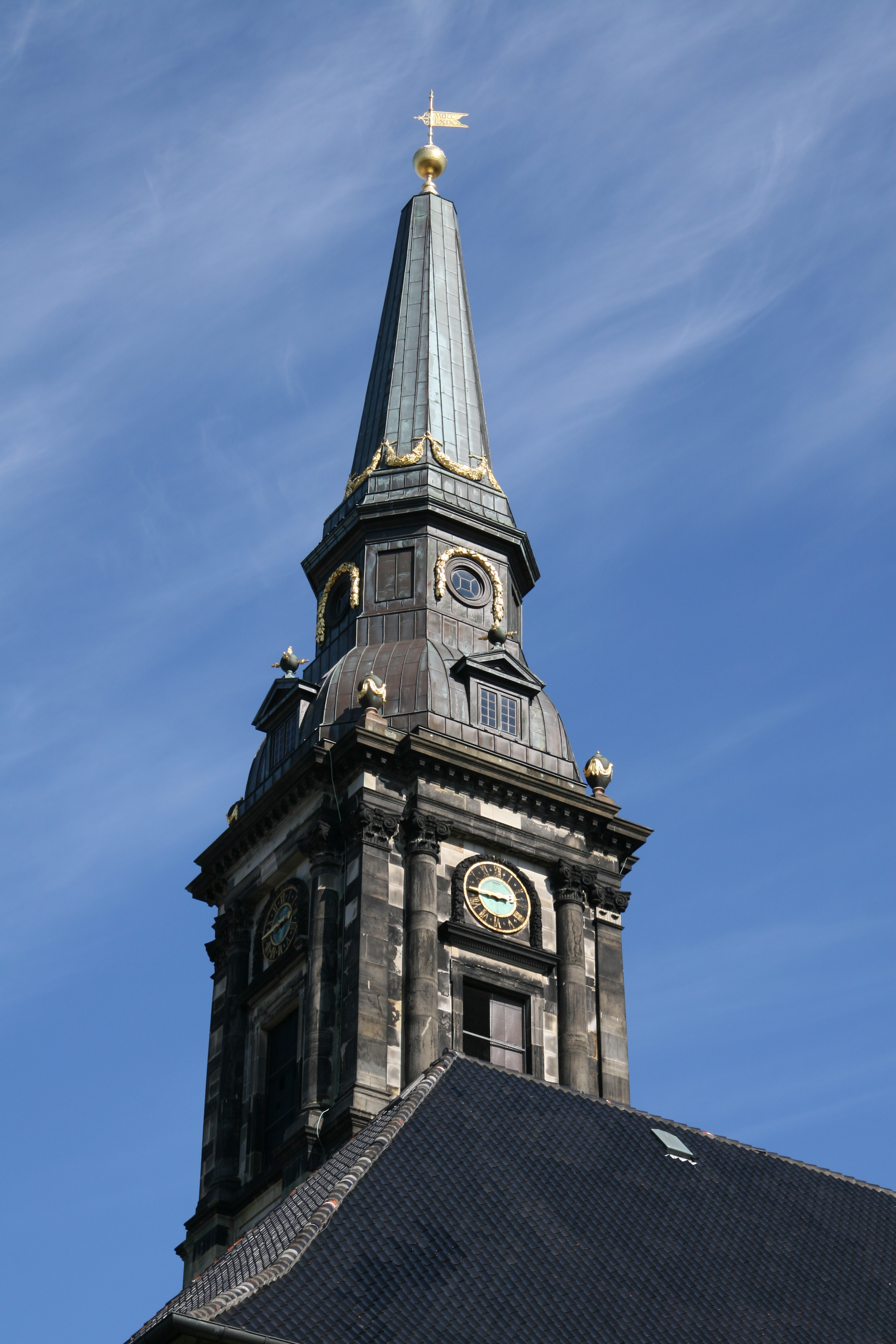 Christians Kirke, Copenhagen, Denmark. Belfry